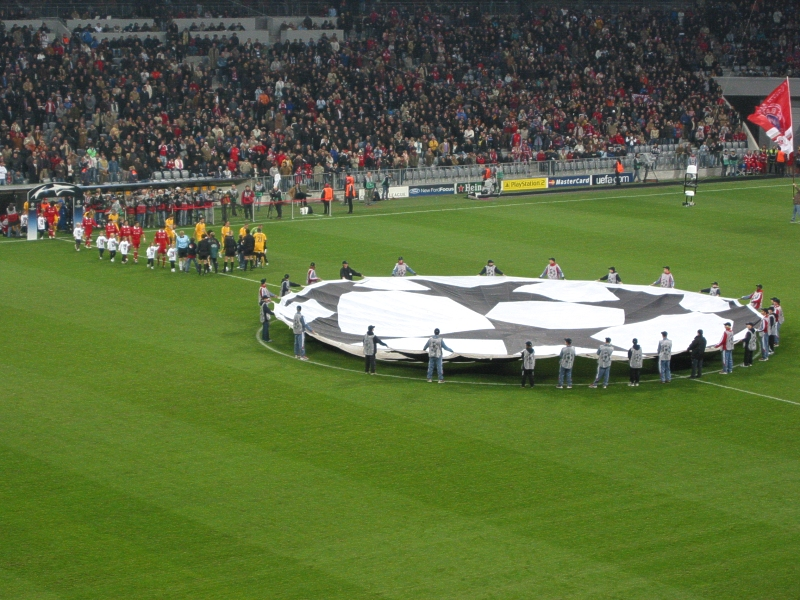 Vor dem Gruppenspiel der UEFA-Champions-League zwischen dem FC Bayern München und Juventus Turin (2:1) am 18. Oktober 2005 in der Münchner Allianz Arena (Rückspiel 2:1 für Juve)